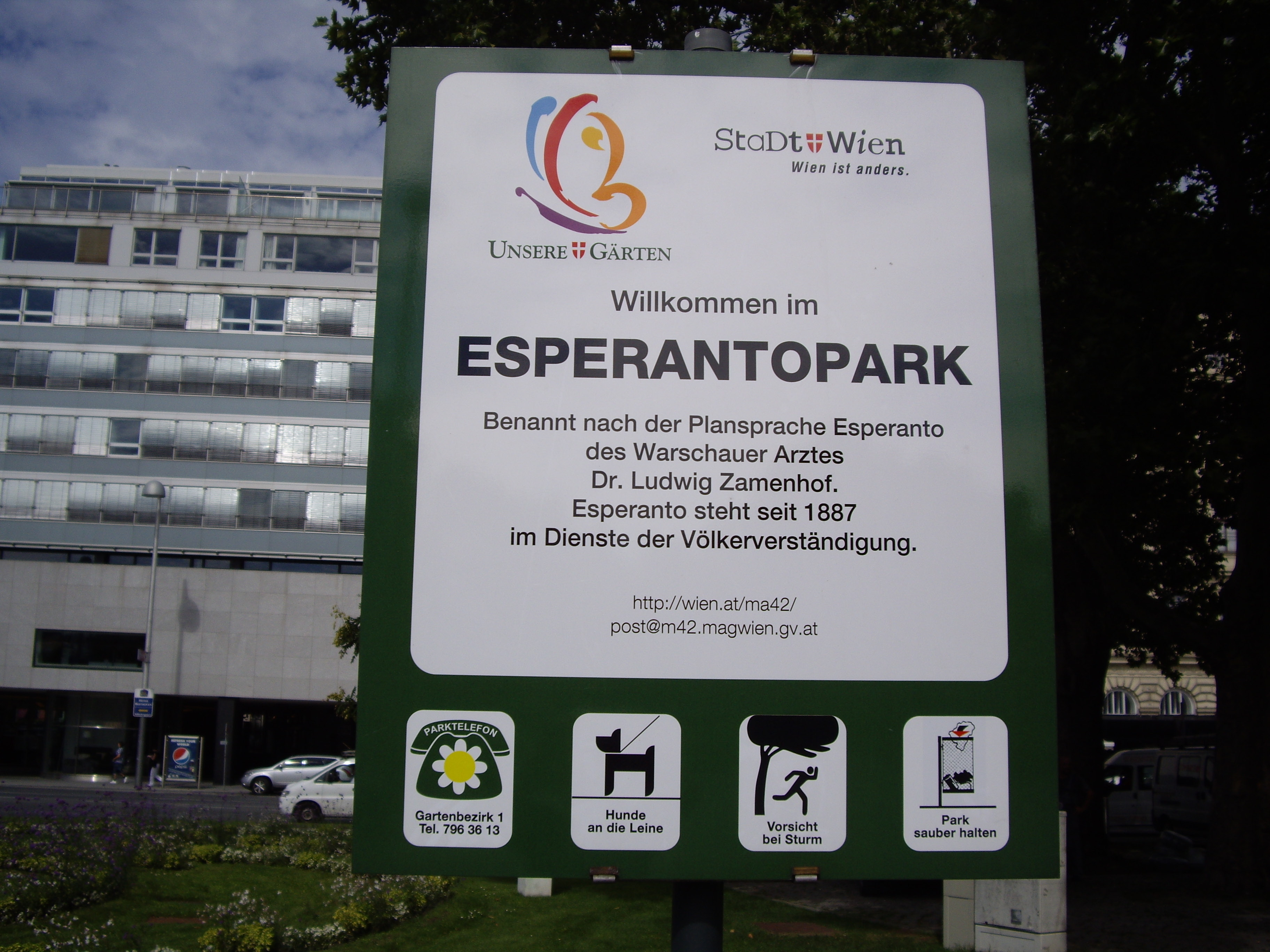 La ŝildo „Esperanto-parko“ en la 1-a viena komunuma distrikto Interna Urbo.